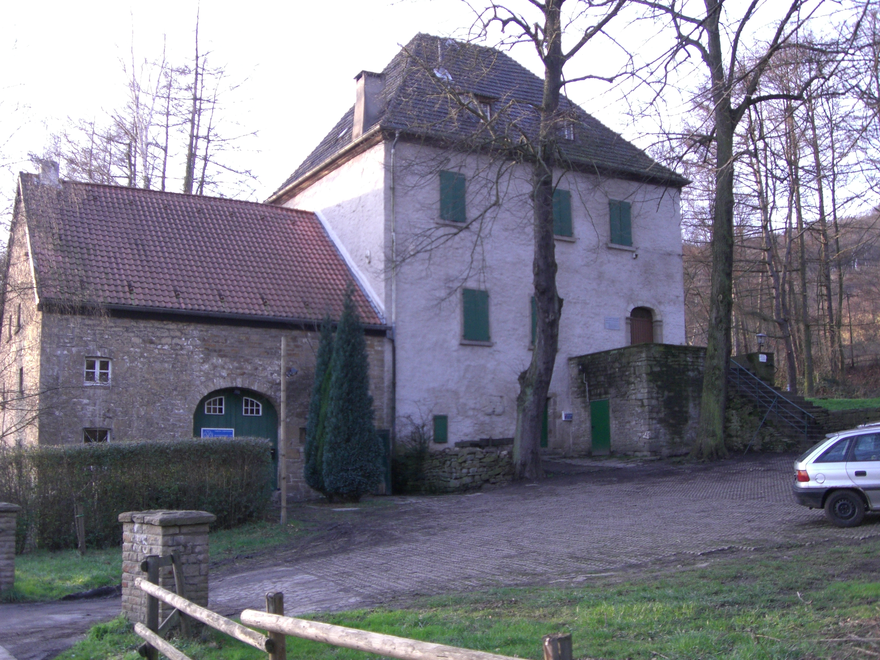 Haus Husen, Dortmund Denkmalschutz Dortmund, Syburg Wohnturm, Teil des Gutshofs Husen